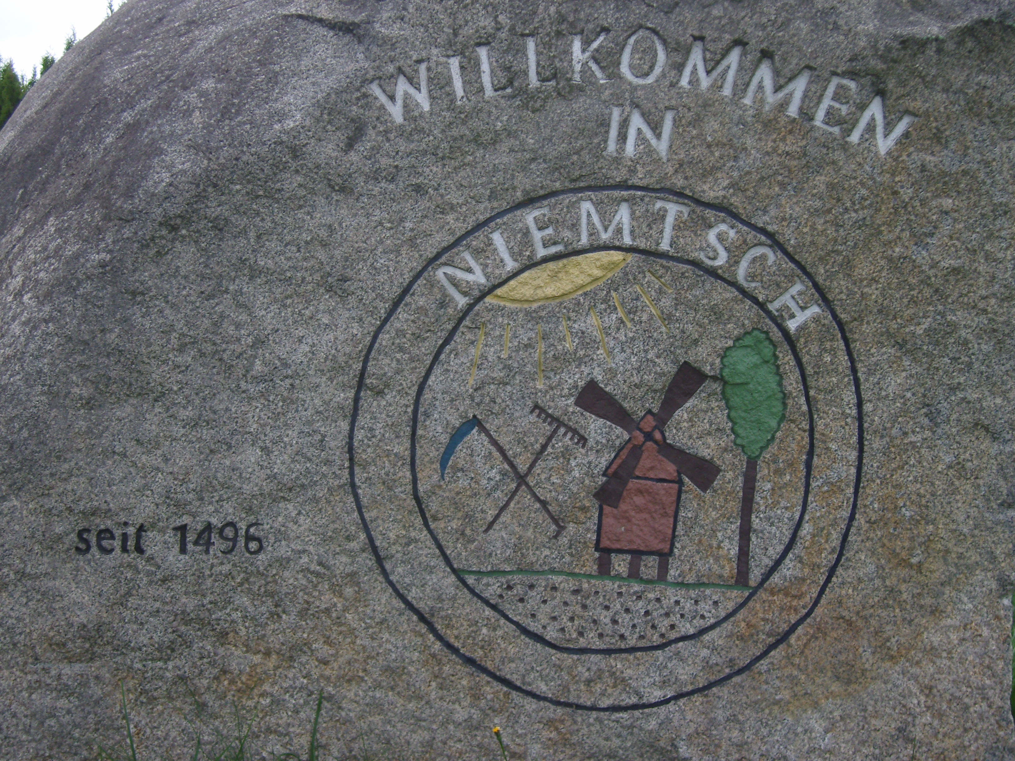 Darstellung des Niemtscher Wappens auf einem Findling im Senftenberger Ortsteil Niemtsch